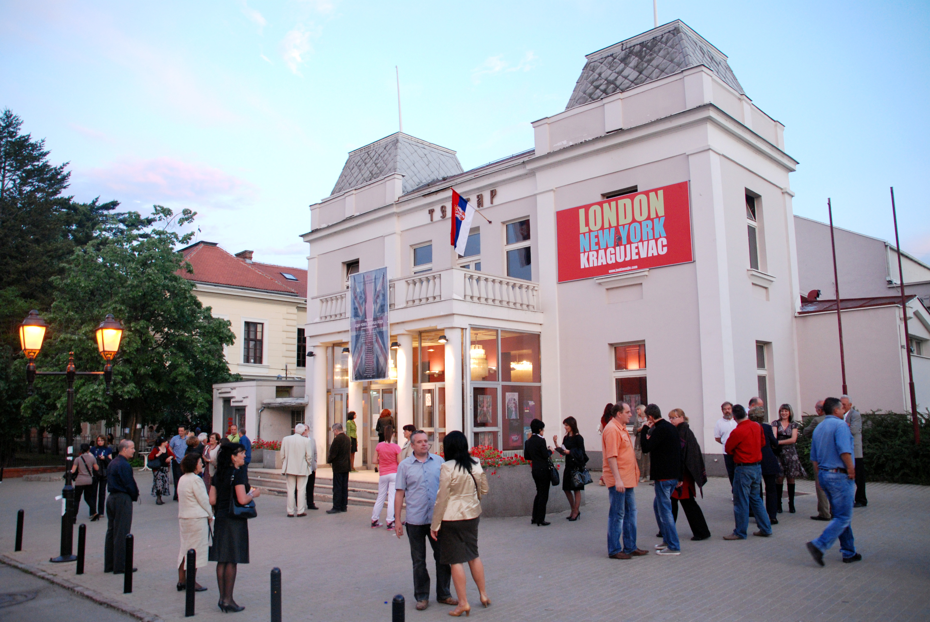 Српски (ћирилица): Књажевско-српски театар је позориште у Крагујевцу основано 1835. године.